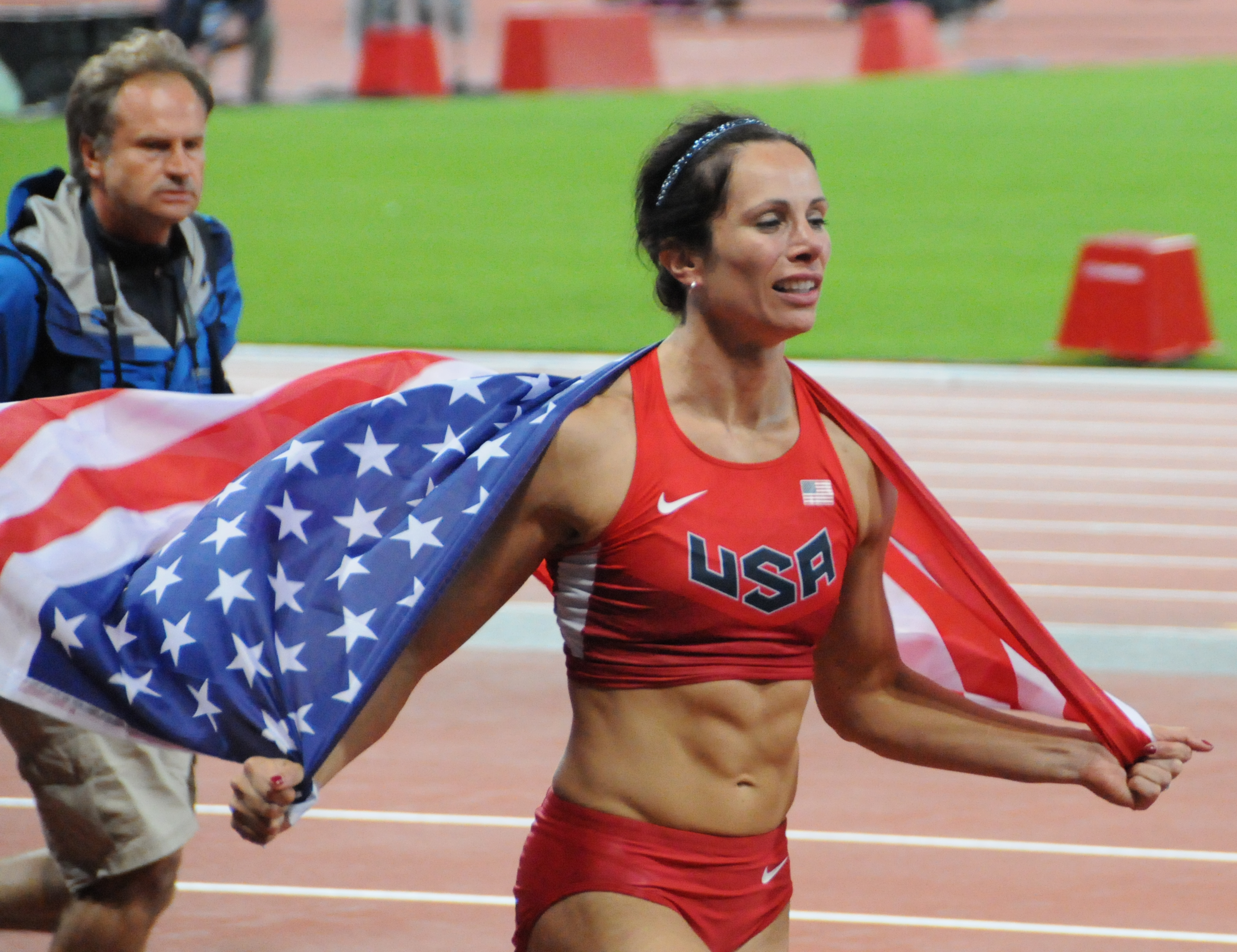 L'américaine Jennifer Suhr: médaille d'or olympique du saut à la perche à Londres